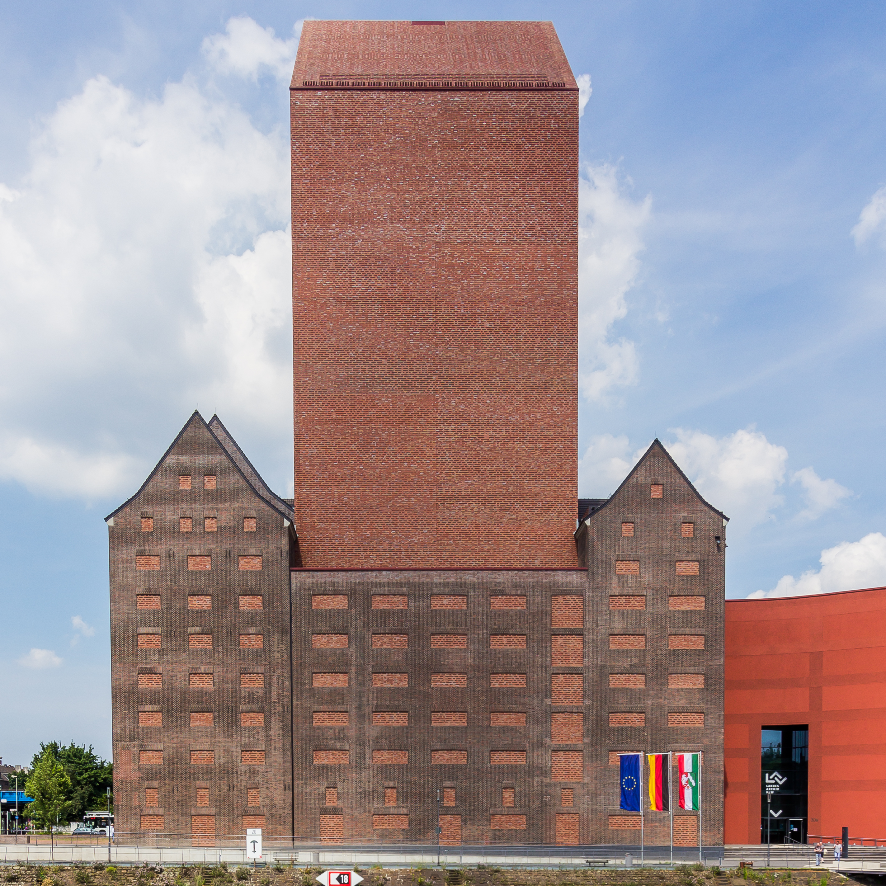 Landesarchiv NRW Duisburg - Magazin im RWSG Speicher. Ansicht über den Innenhafen hinweg